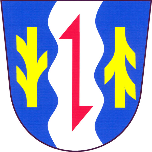 Znak obce Jetřichov